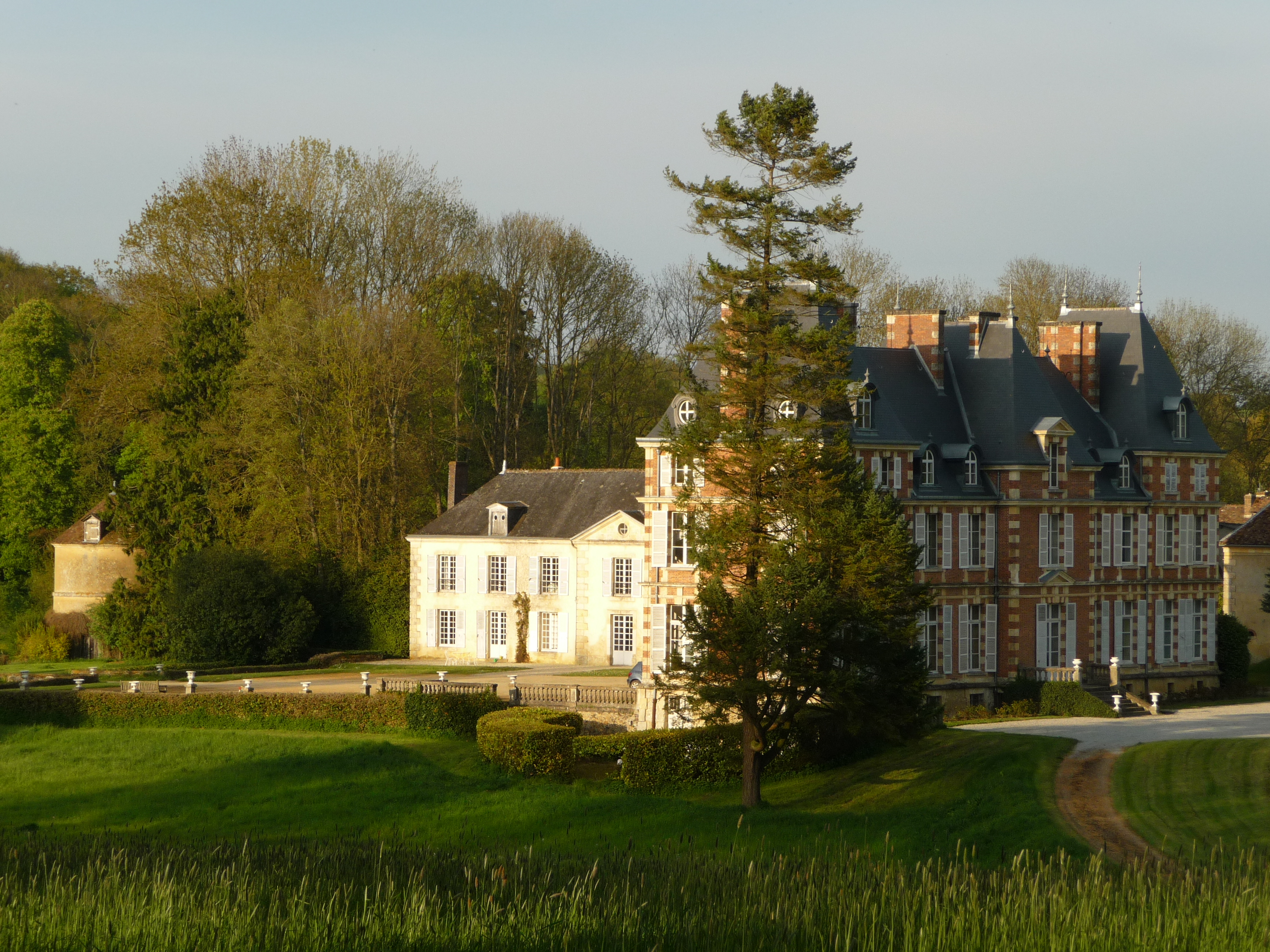 Château de Pouvrai dans l'Orne.